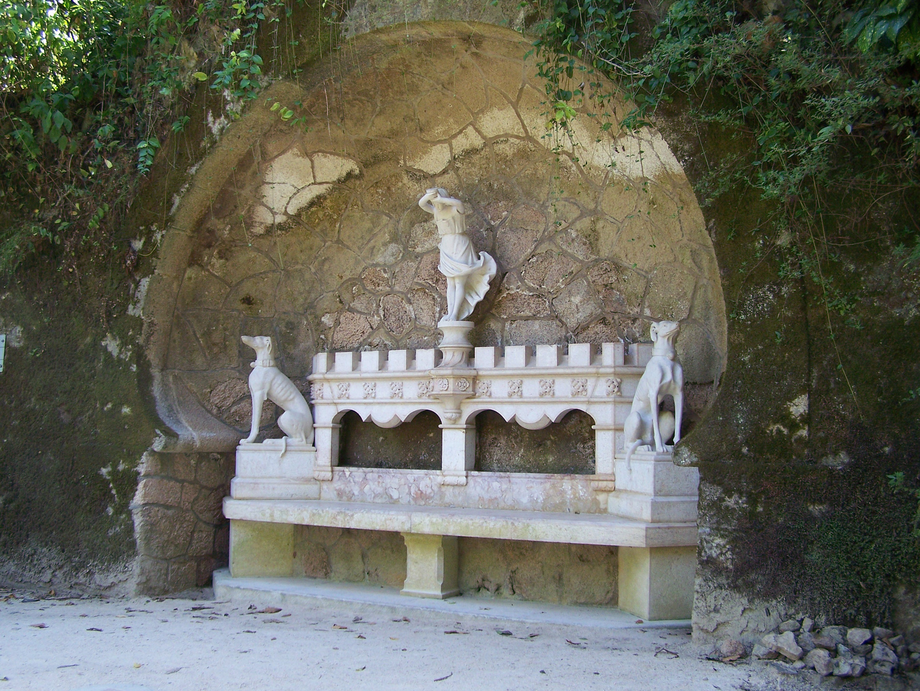 Quinta da Regaleira, banco de jardim perto da Gruta do Labirinto. Sintra, Portugal